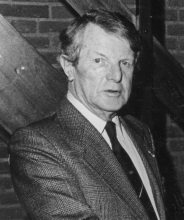 J.D. de Kam, voormalig burgemeester van Duiveland